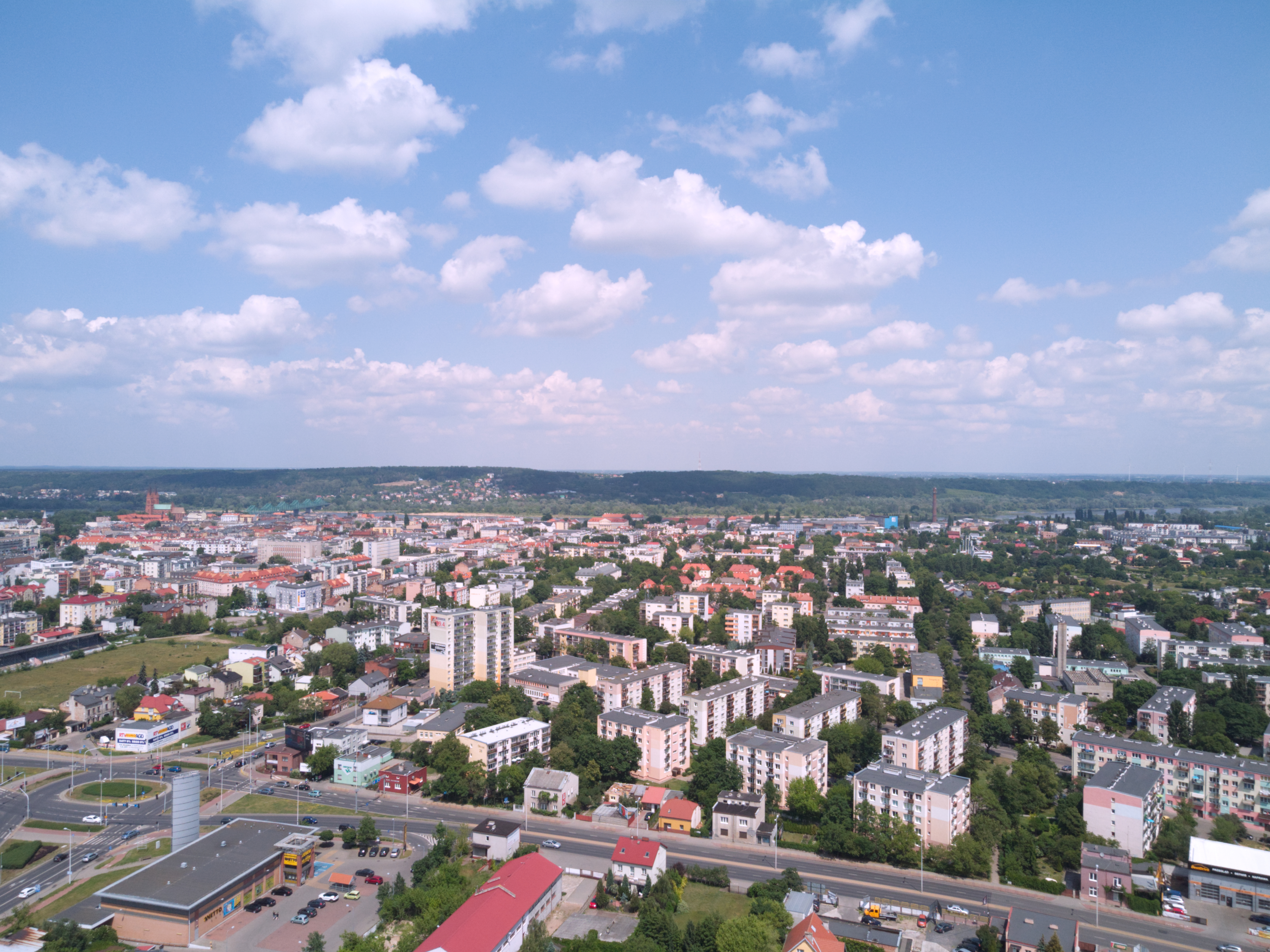 Dzielnica Śródmieścia z lotu ptaka (2020 r.)